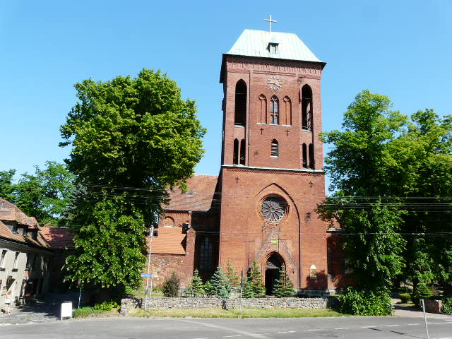 Exteriér katedrály v Kamienu Pomorskiem, Západopomořanské vojvodství, Polsko